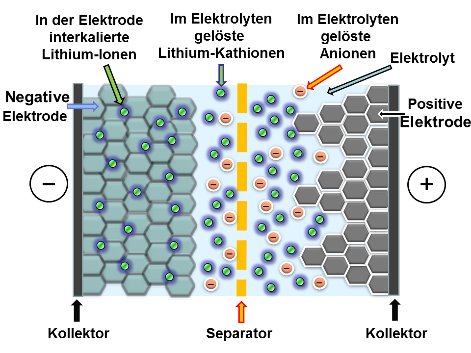 Schnitt durch eine kapazitive Zelle eines Lithium-Ionen-Kondensators